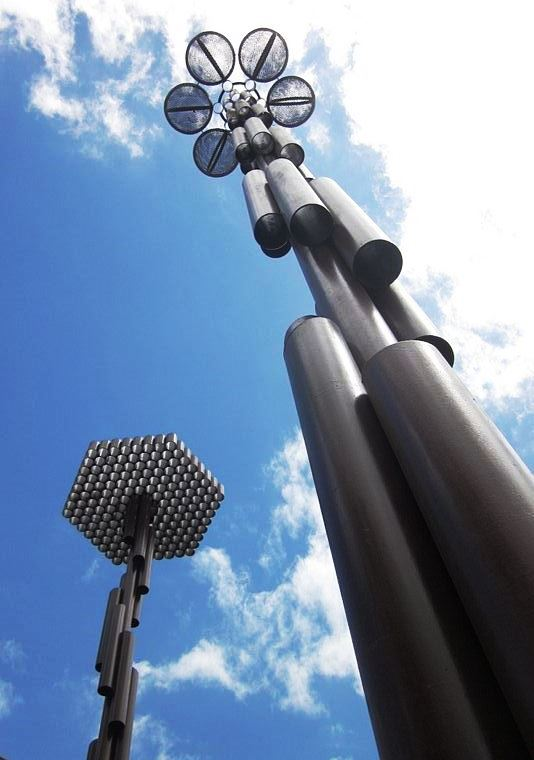 Escultura en acero elaborada por Ibo Bonilla, Basada en el concepto "Flor de la Vida" y "Geometría Sagrada", con 18m de alto es la más alta de Costa Rica.